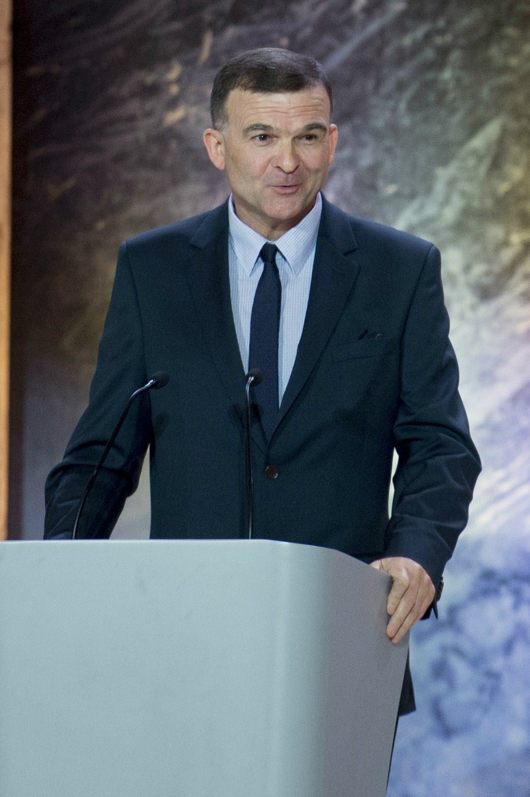 Prof. Tadeusz Wolsza. Warszawa, KPRM, uroczystość wręczenia Nagród Prezesa Rady Ministrów.